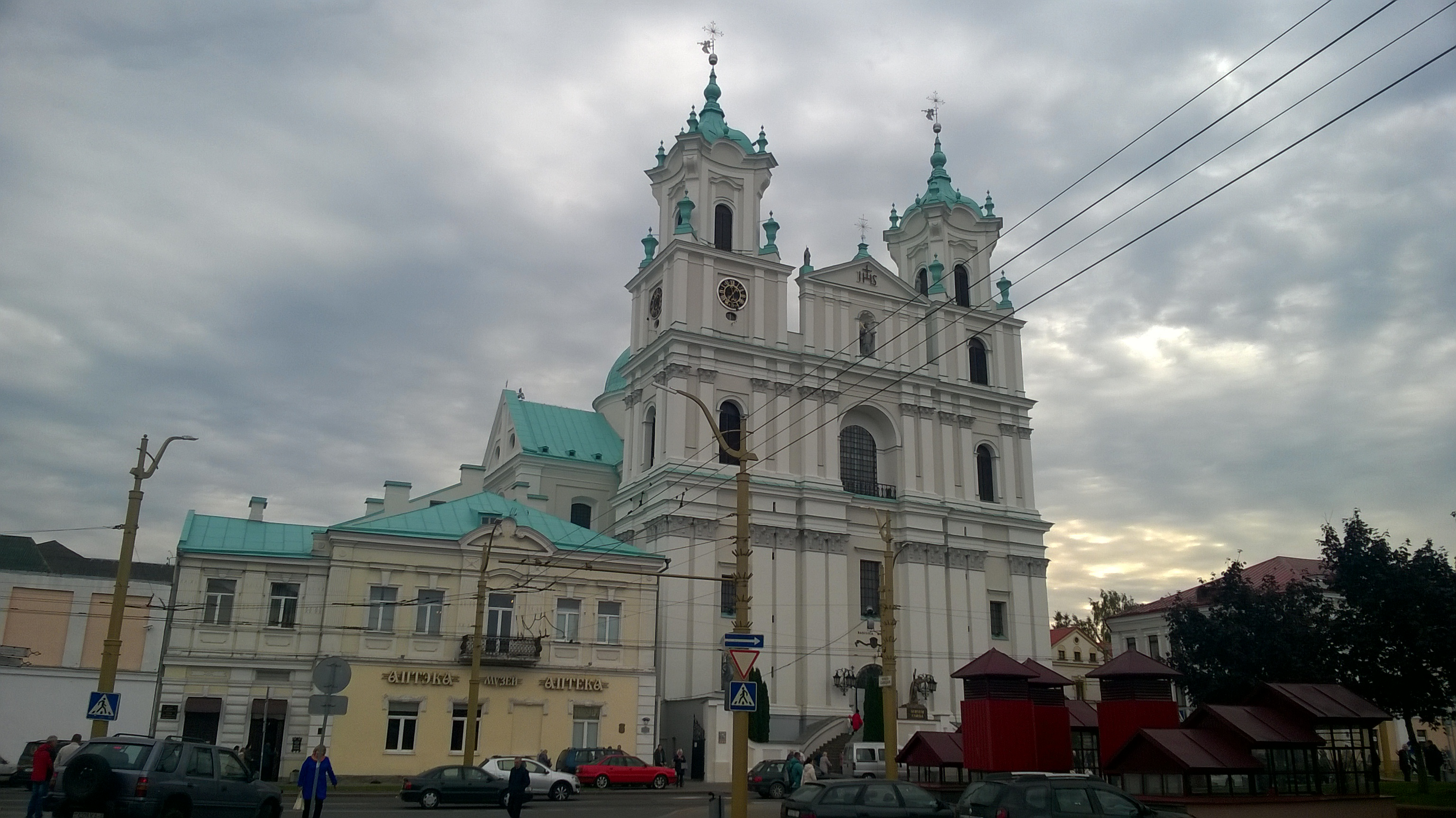 kościół grodzieński gdzie odbywają się msze w języku polskim